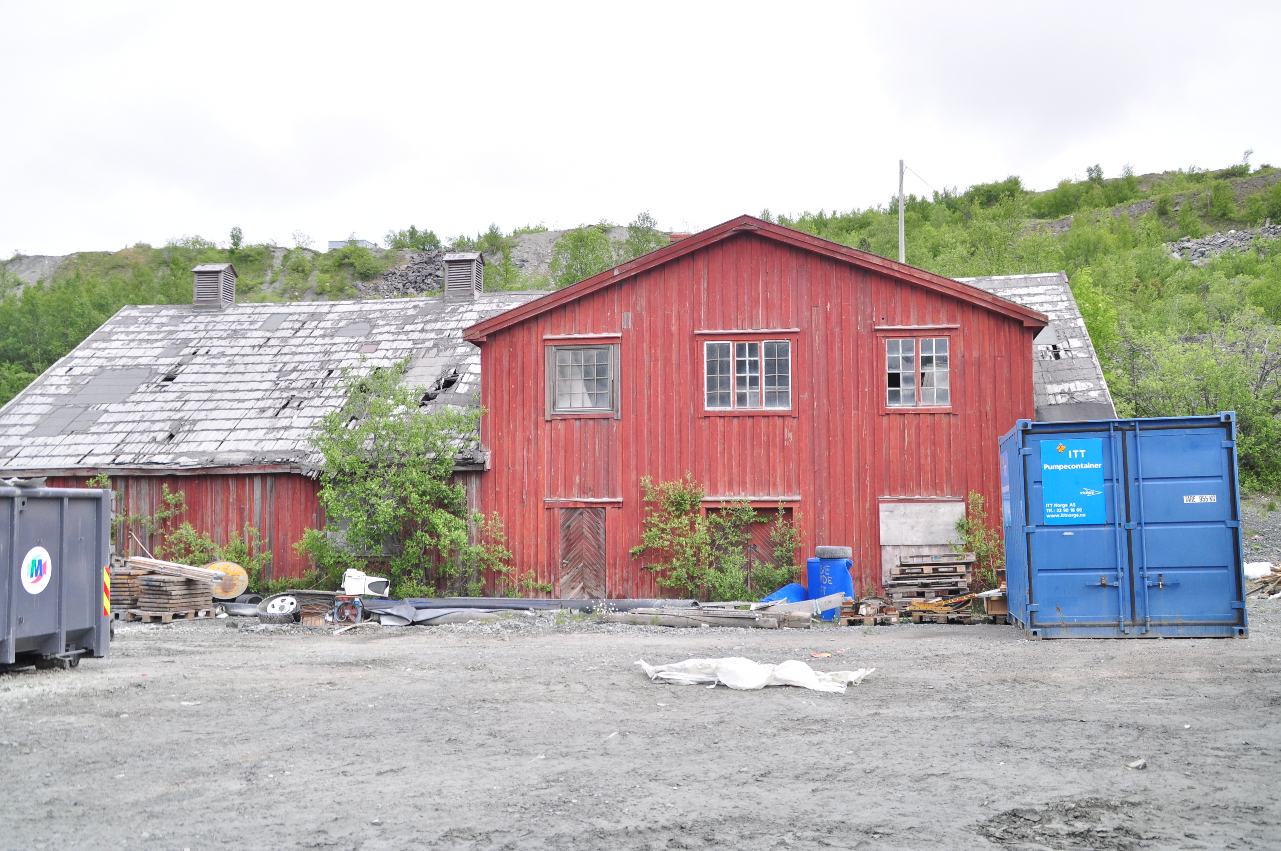 Rørbua juni 2013 før restaureringsarbeidet begynte